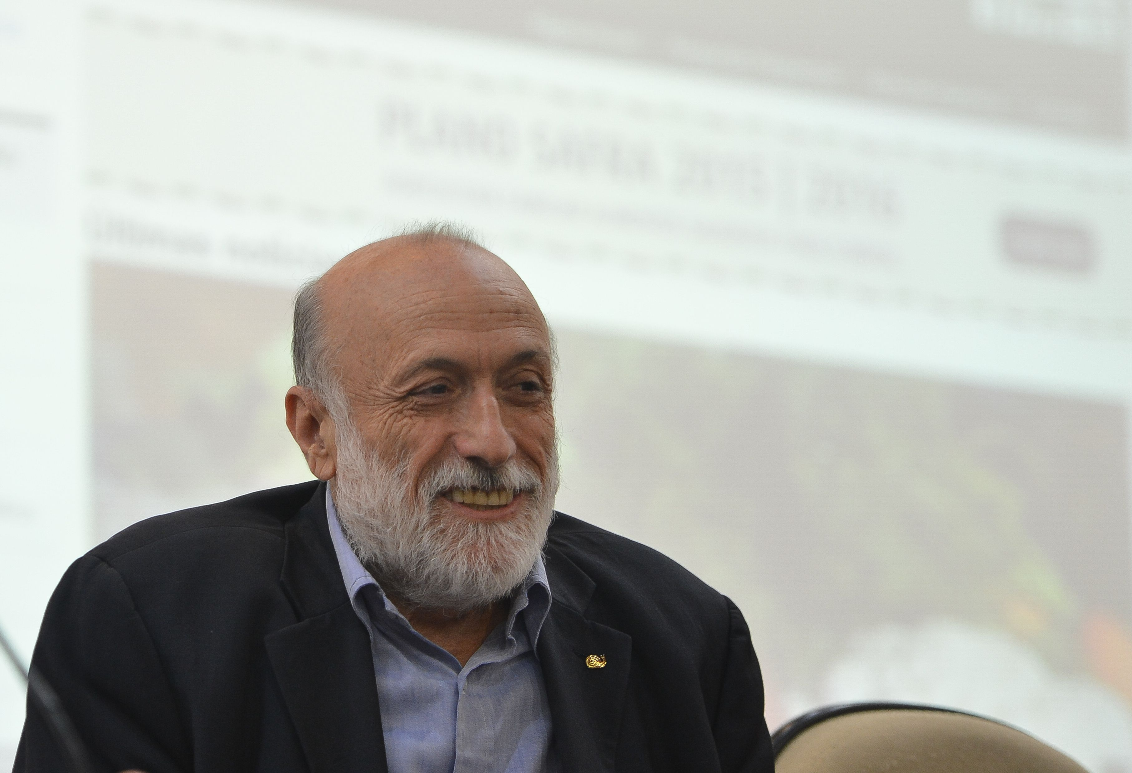 O presidente da Slow Food, Carolo Petrini, durante assinatura de acordo de cooperação entre o Governo brasileiro e a associação internacional.